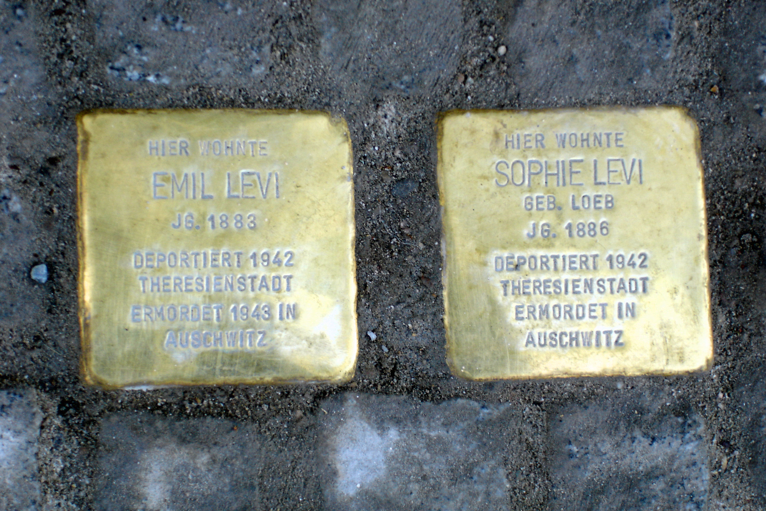 Stolpersteine für Emil und Sophie Levi, geb. Loeb, Ffm-Bergen-Enkheim, Im Sperber 6